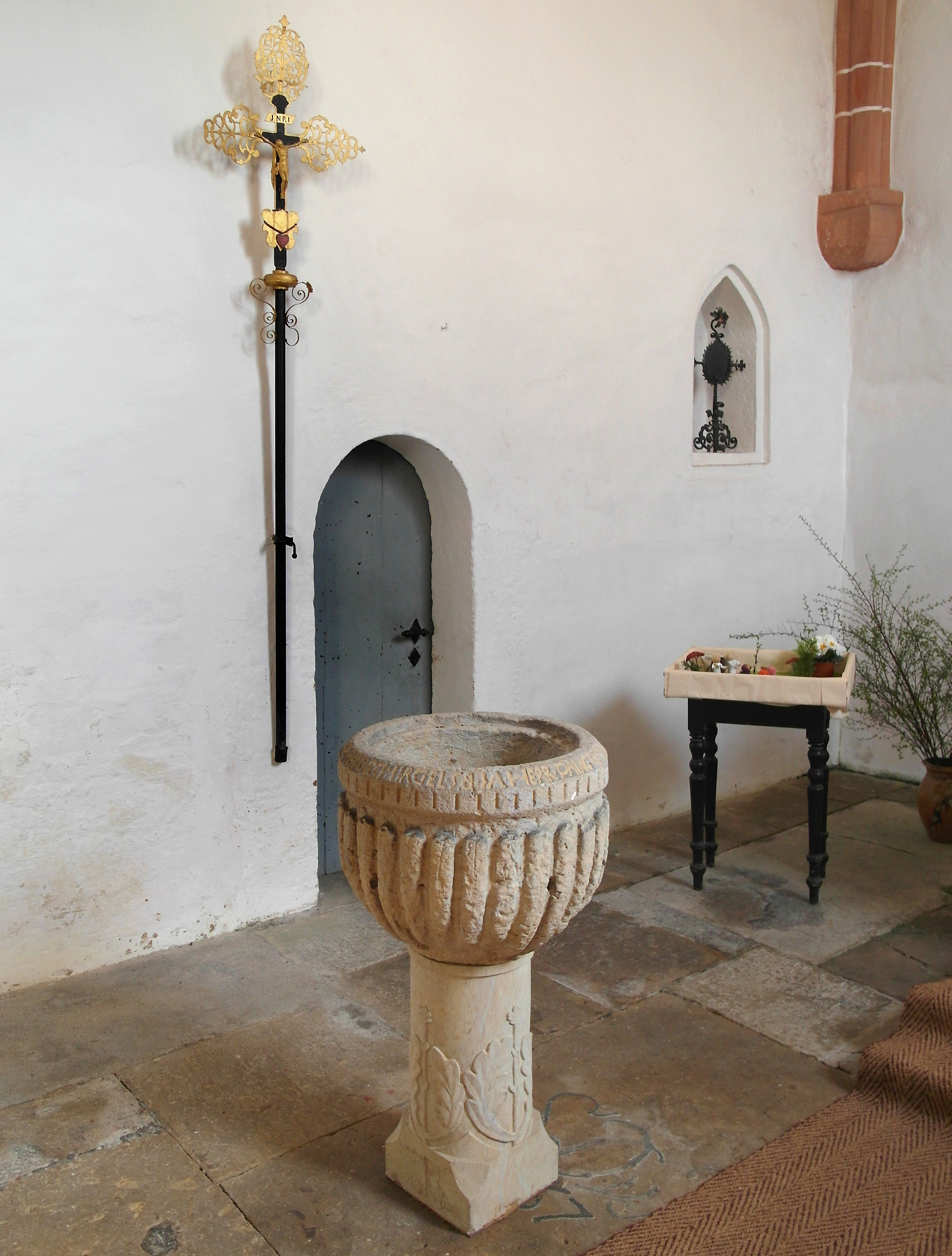 05.04.2016 01796 Struppen: Kleinstruppen, Kirchberg 1.Die Kirche wurde vom Deutschritterorden erbaut. Heutige Kirche von 1740. Sandsteintaufe aus dem 16. Jahrhundert im romanischen Chor. Links neben der Sakristeitür ein Vortragekreuz, rechts eine gotische Sakramentsnische. [SAM4060.JPG]20160405070DR.JPG(c)Blobelt